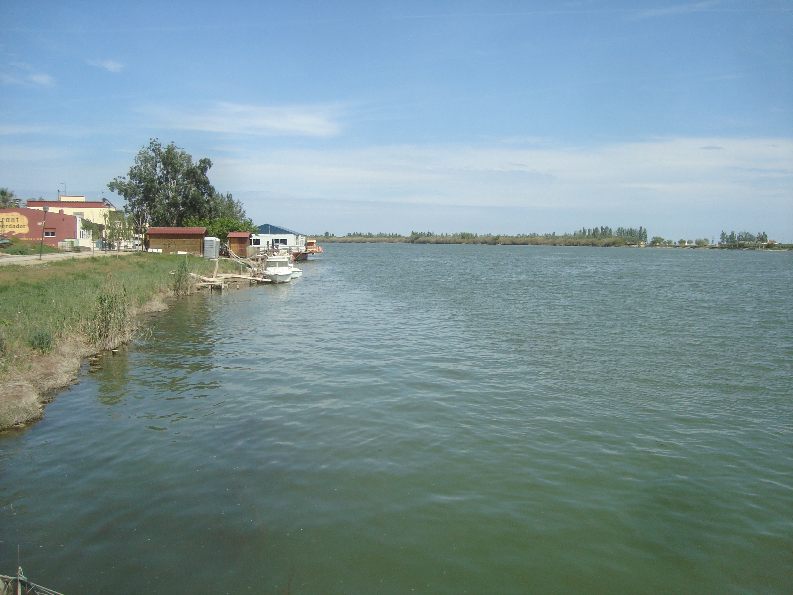 El río Ebro a su paso por Deltebre (Tarragona)